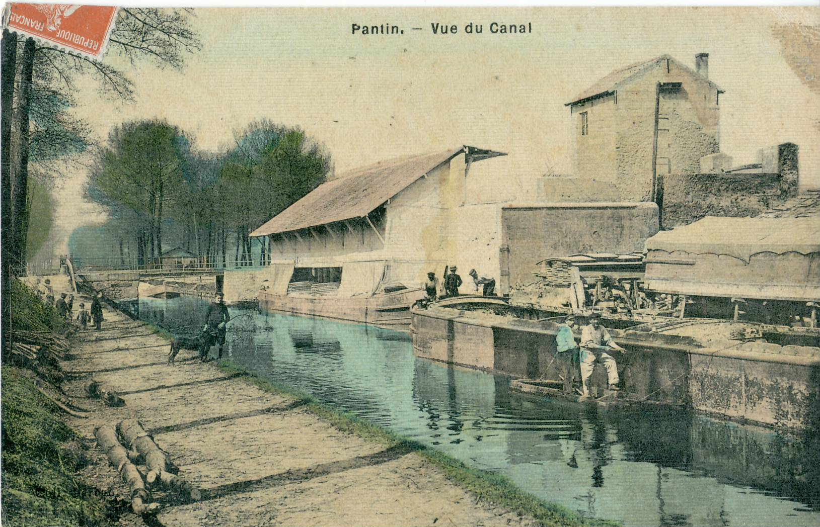 Carte postale ancienne PANTIN - Vue du Canal (Canal de l'Ourcq)